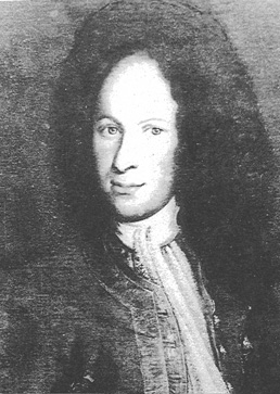 Lars Gathenhielm (1689–1718)